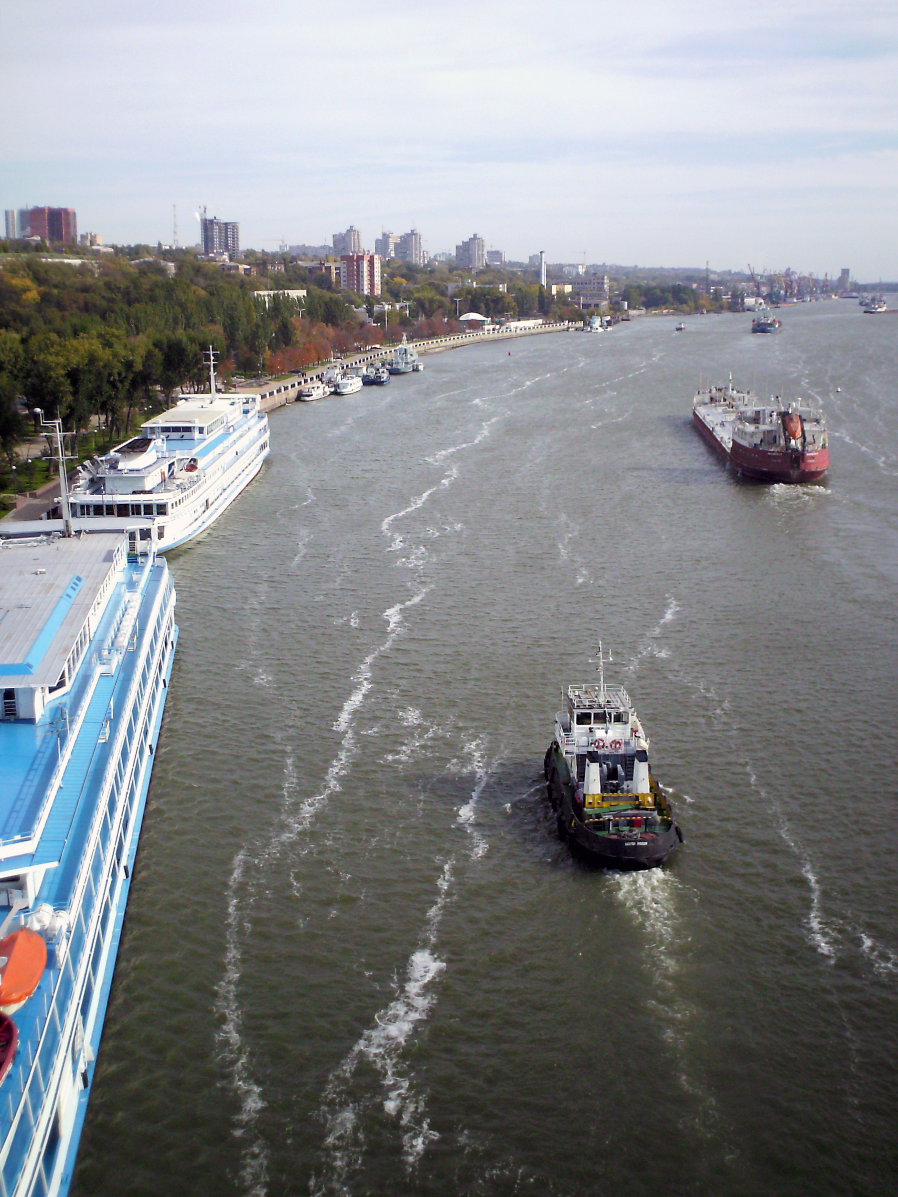 Ростов на Дону